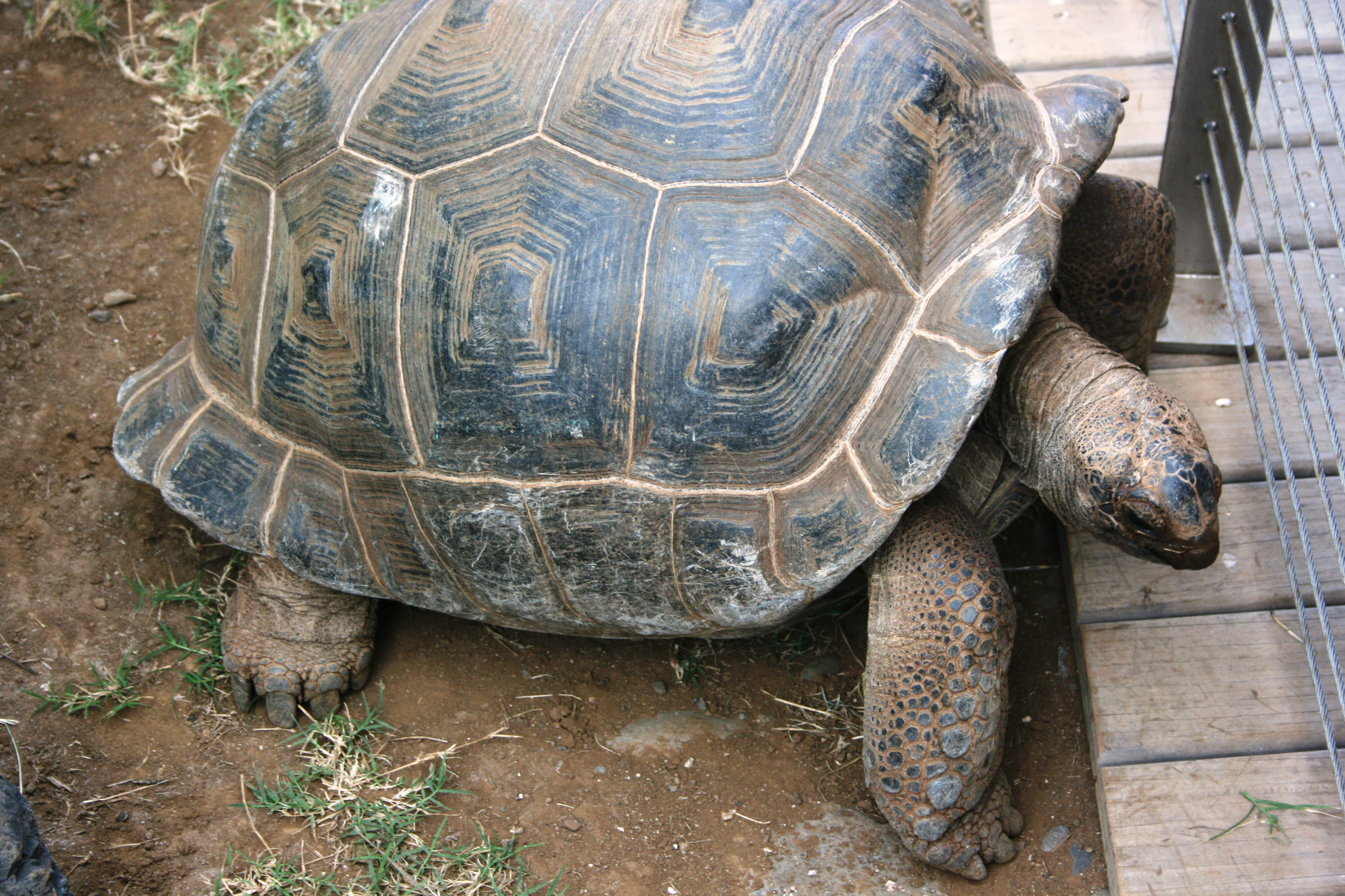 Tortue géante des Seychelles à Kélonia